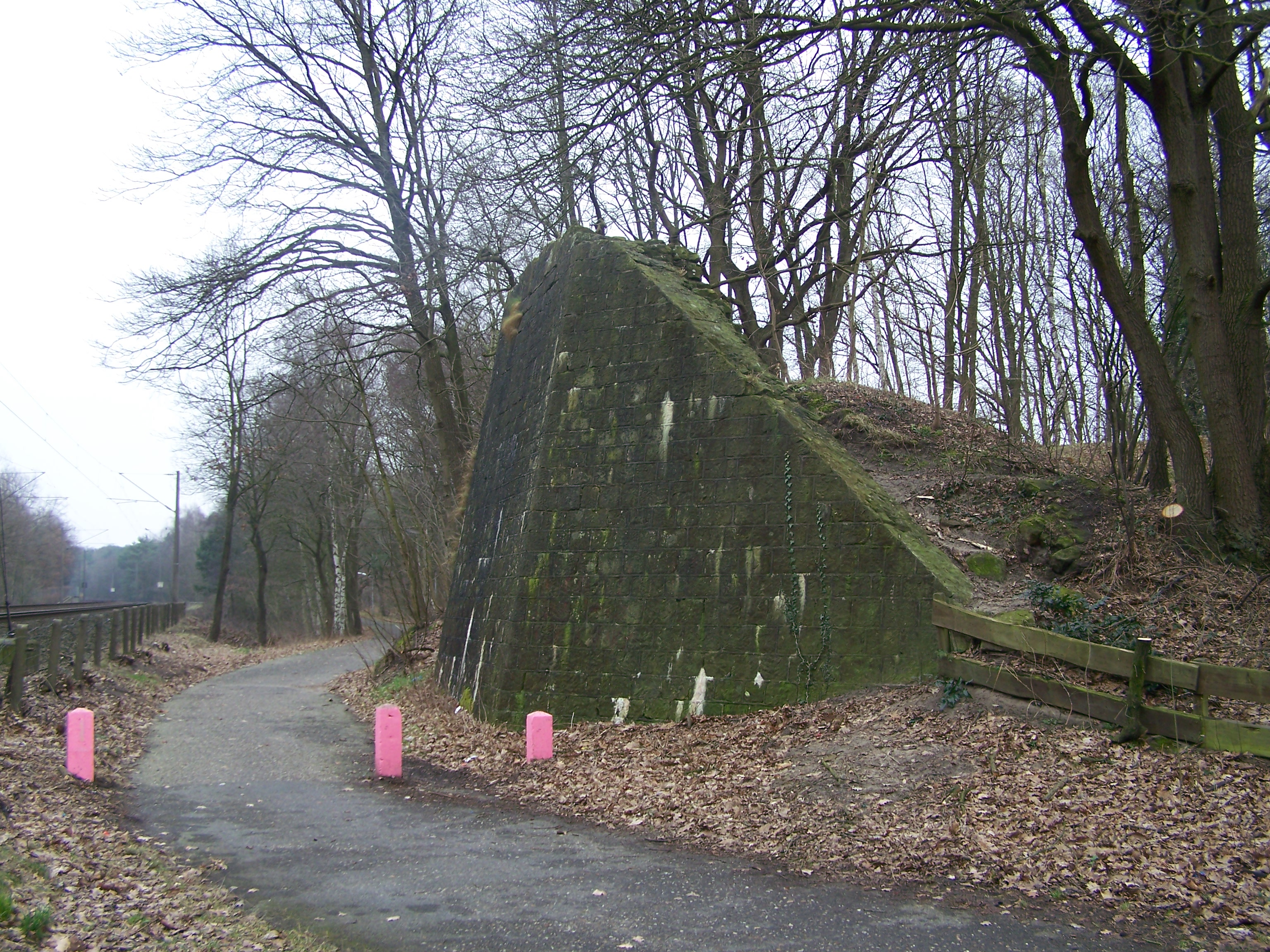 Östlicher Auflieger in der Nähe der Kleinbahn Lingen–Berge–Quakenbrück